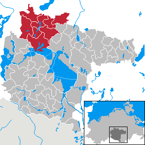 Amt Moltzow in Mecklenburg-Western Pomerania - District Müritz